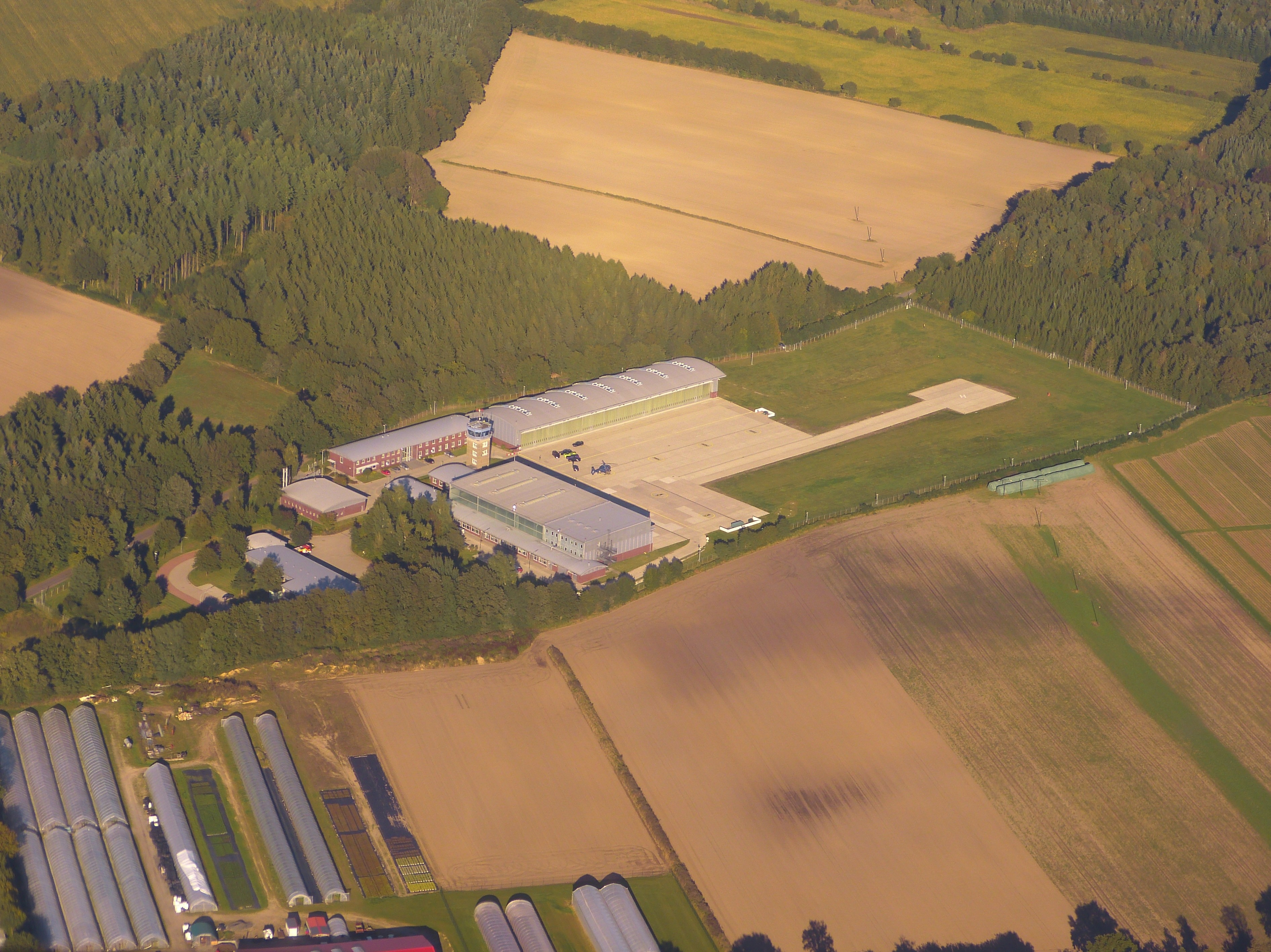 Die Luftaufnahme zeigt den Flugplatz der Bundespolizei-Fliegerstaffel Fuhlendorf.